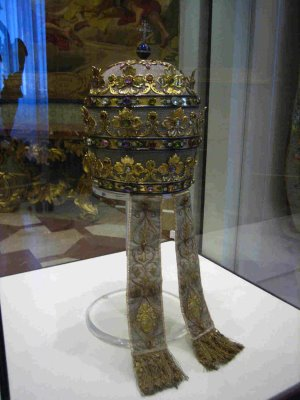 Tiara Papal de Piu IX em exposão na capela sistina